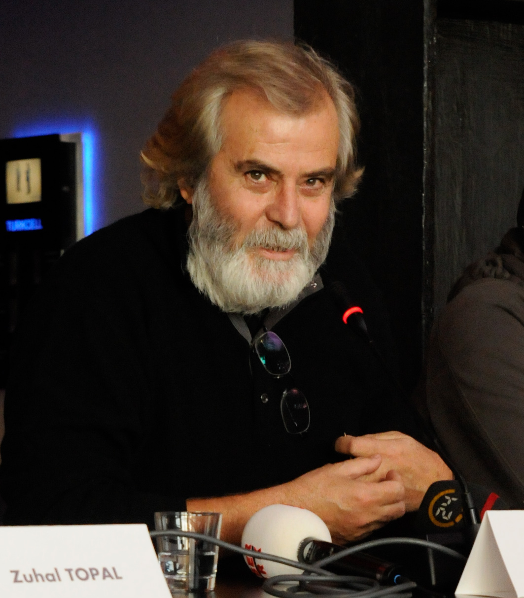 Tarık Akan à une conférence de presse en 2008 pour le film Deli Deli Olma.